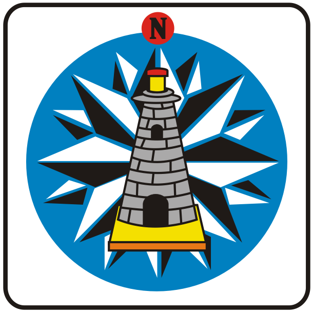 Escudo del Municipio de Isla Mujeres